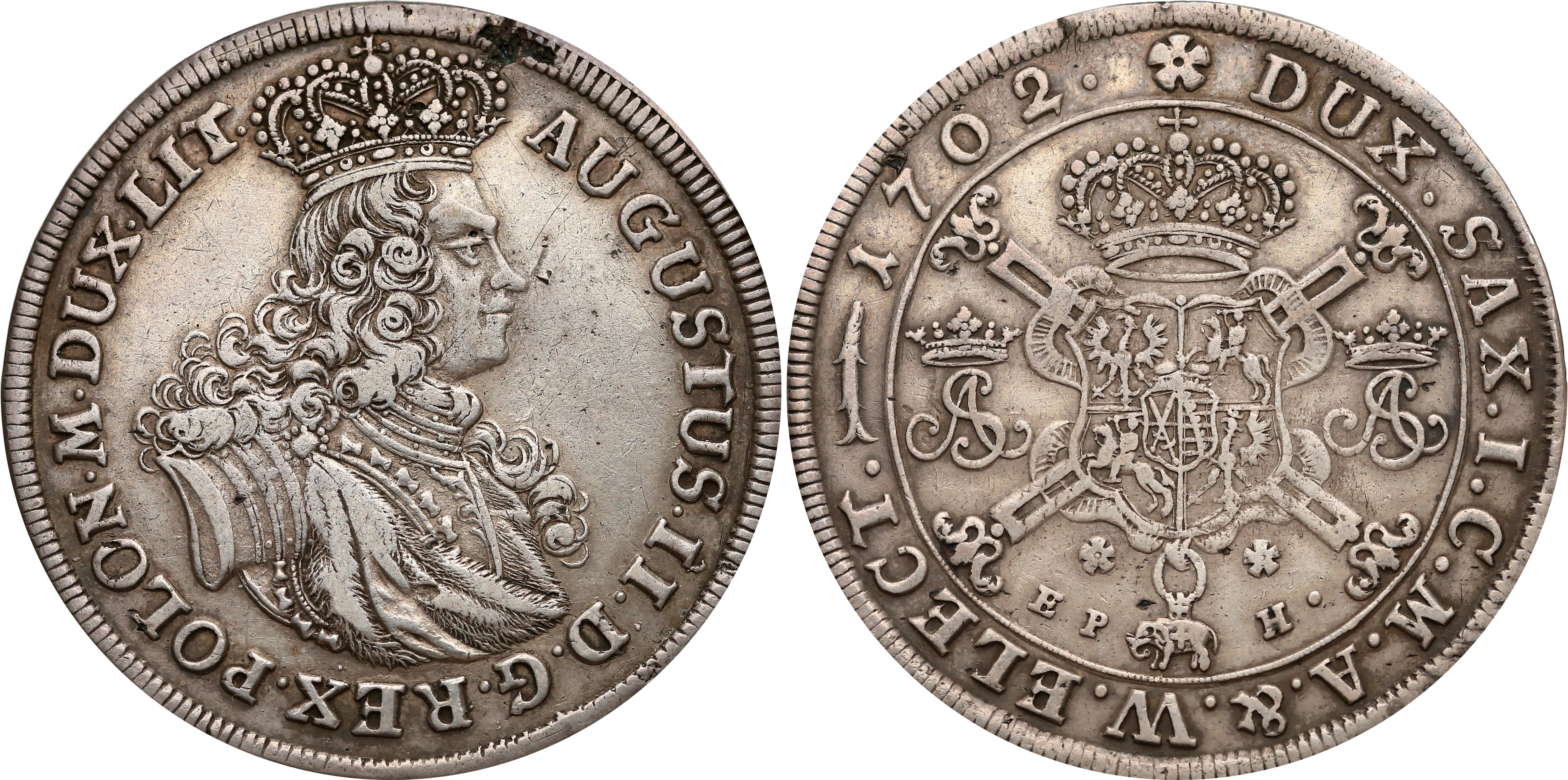 Talar koronny 1702